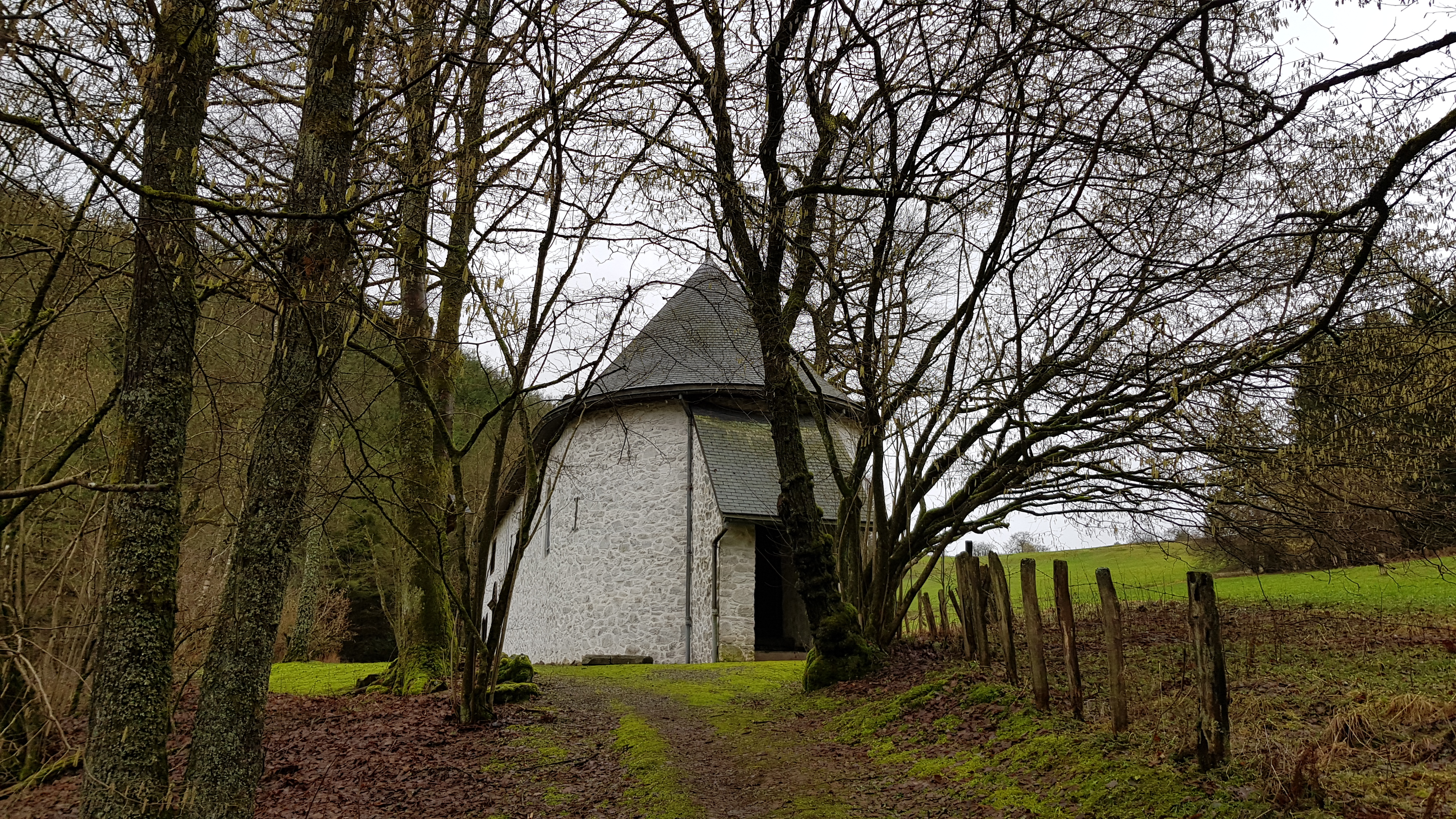 Kluizenarij van Sint-Antonius / Kluizenarij van Bernister, Malmedy, België